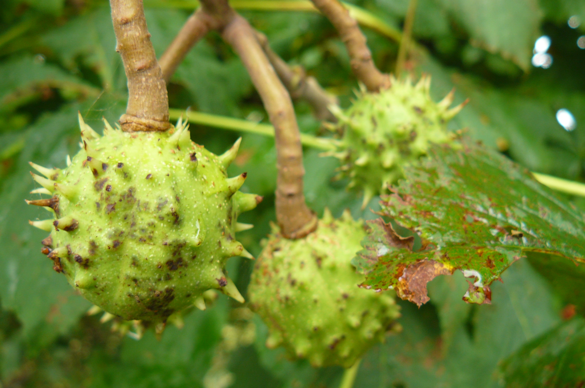 Kasztany w Wielkopolsce.